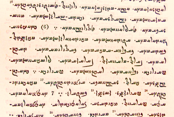 تصویری از پاره ششم دفتر یشت ها از کتاب اوستا که در آن به کوه رئونت اشاره شده است